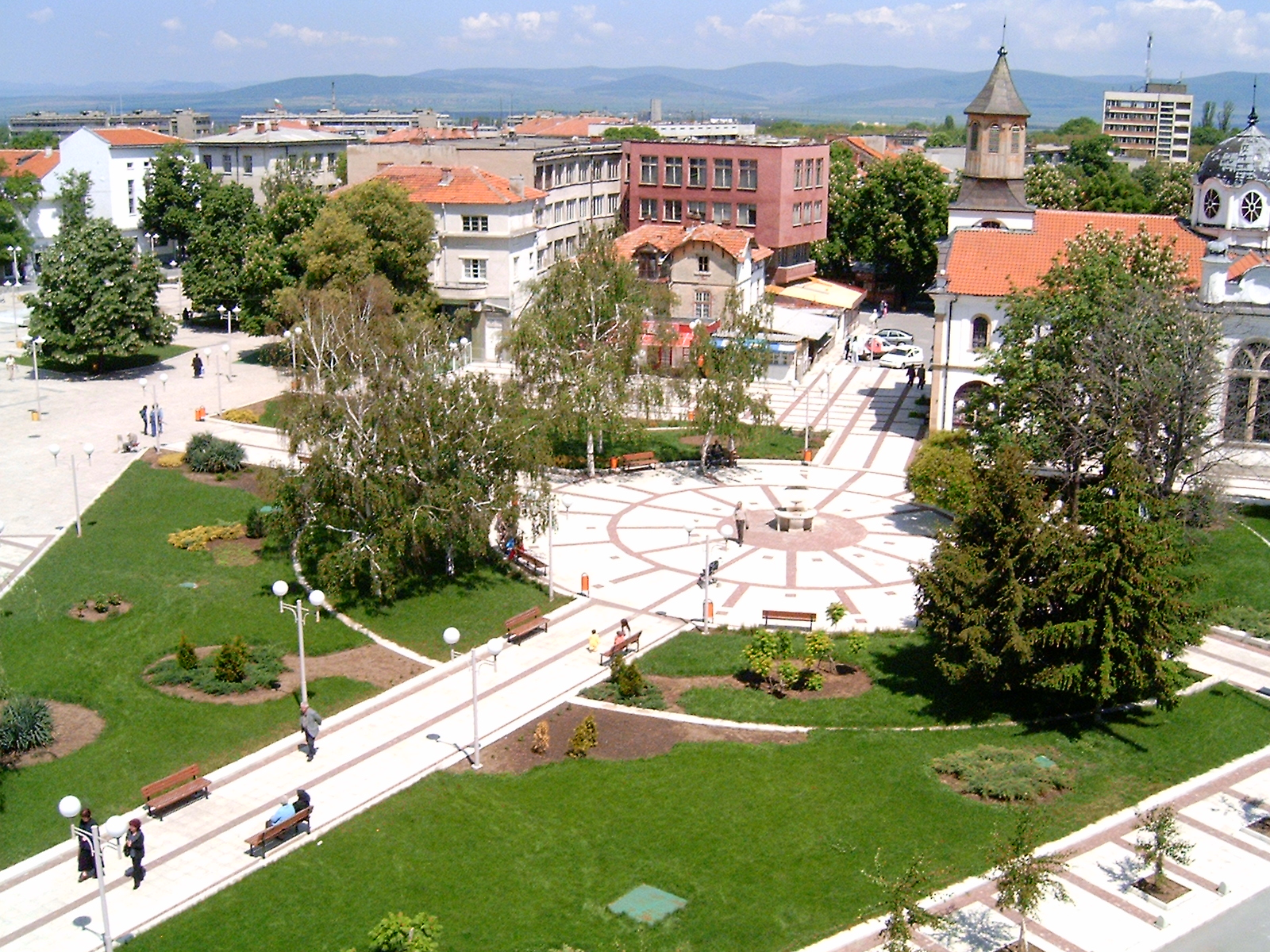 © 2003 Димитър Колев